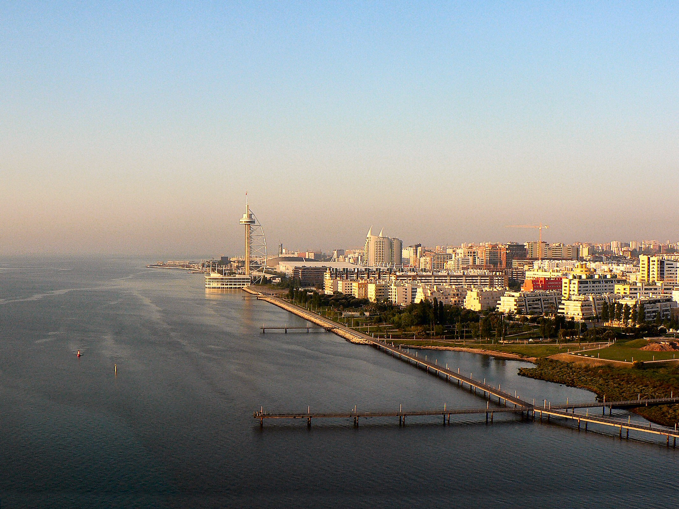 Rio Tejo e Parque das Nações vistos da Ponte Vasco da Gama